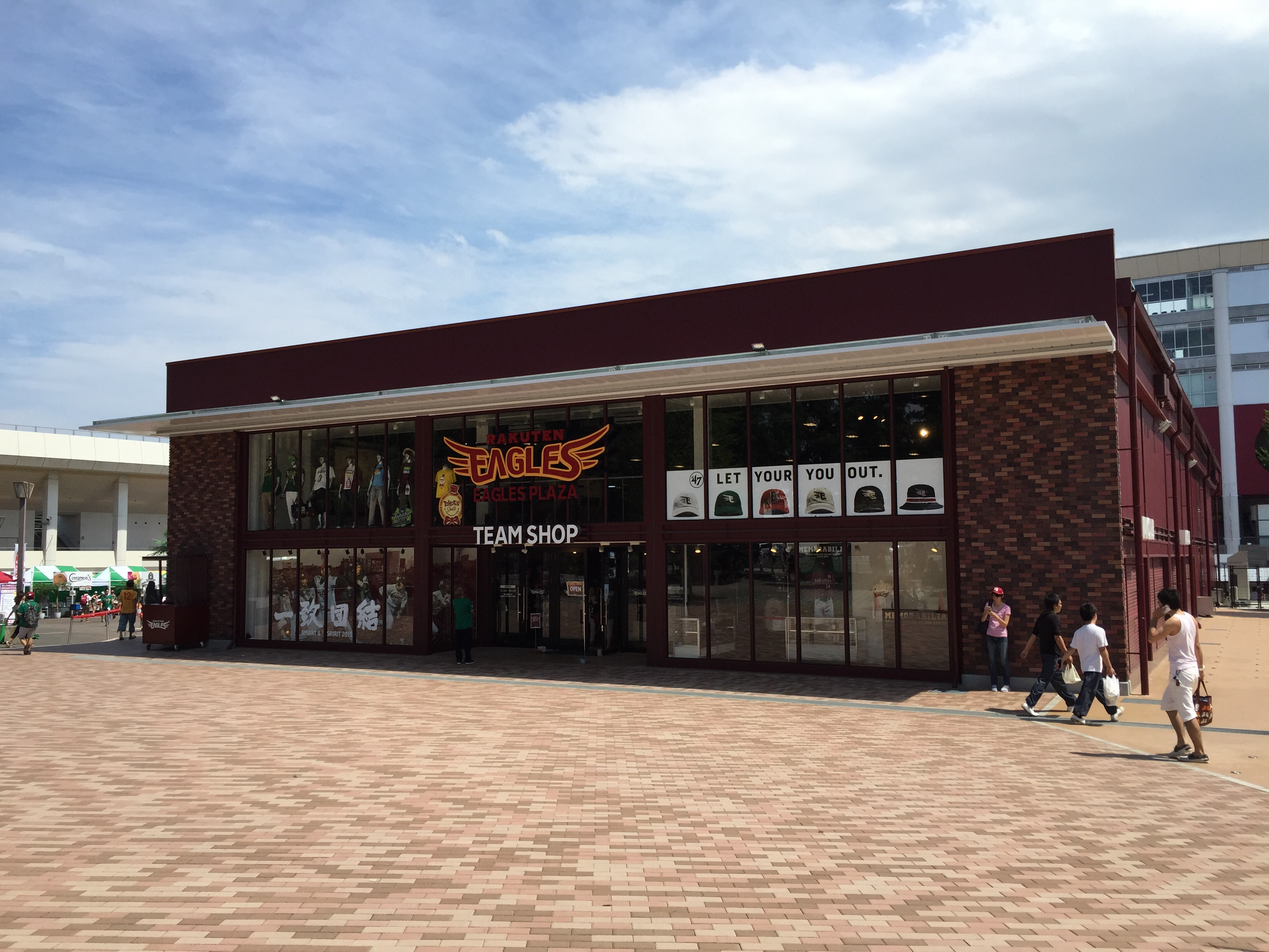 楽天Koboスタジアム宮城にあるイーグルスプラザ「チームショップ」